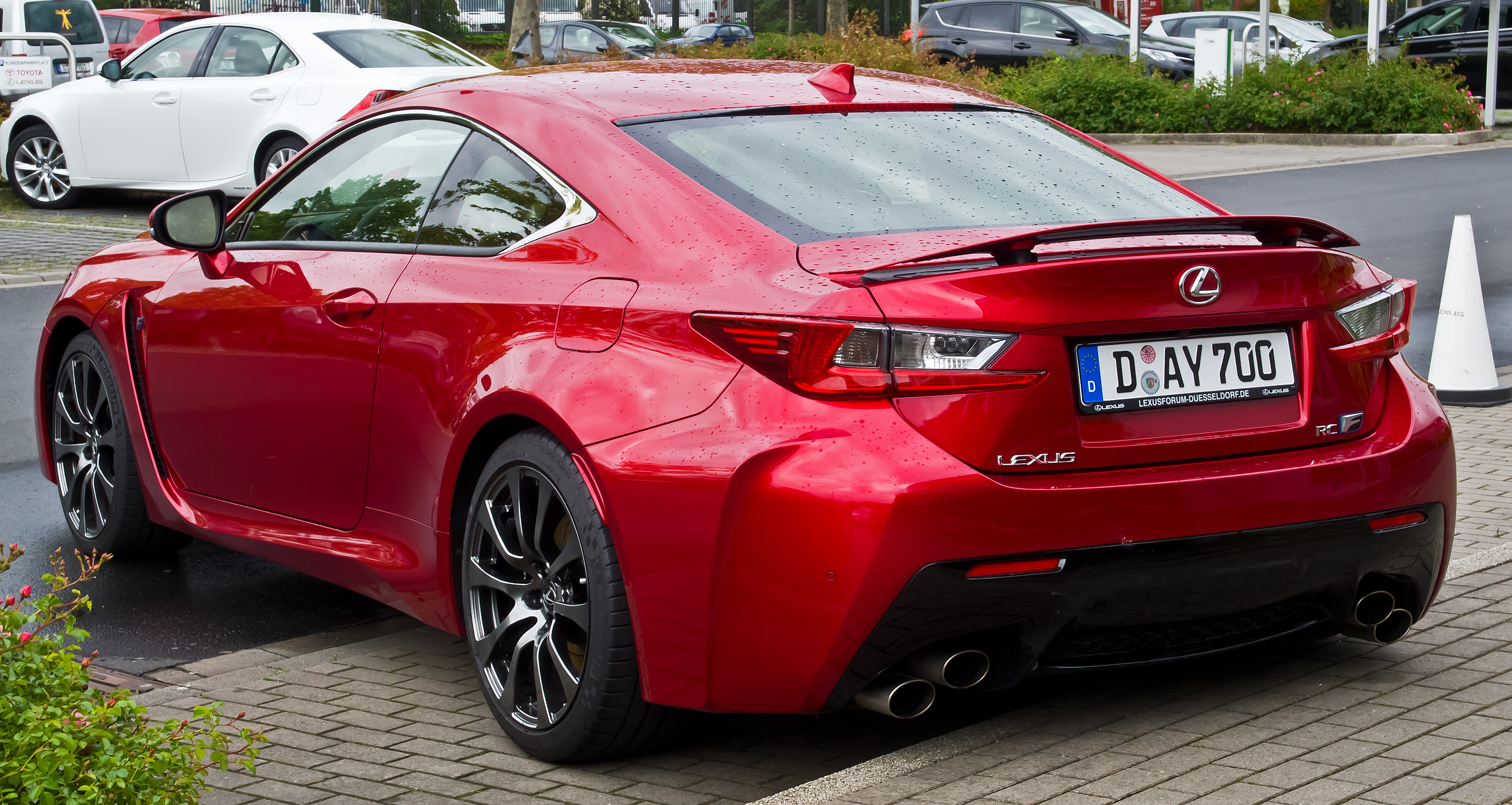 Lexus RC F